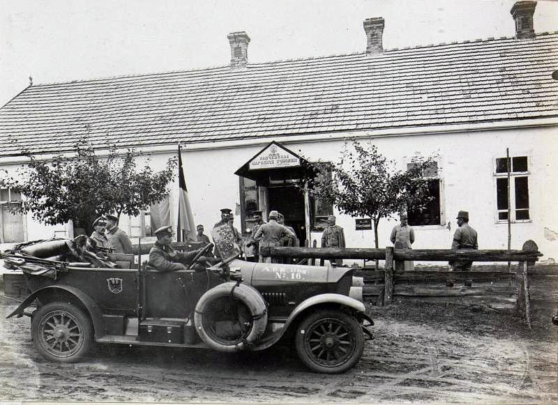 Der Kommandeur der deutschen Bugarmee, General Linsingen, besucht das 10.Korpskommando in Kopcza bei Kolky (Rajon Manewytschi) am 20.9.1915.